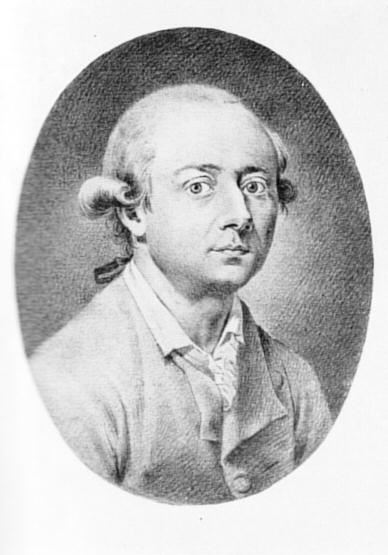 Johann Heinrich Wilhelm Tischbein(1751-1829). Kreidezeichnung von Johann Heinrich Lips Mit Tischbein, seinem Hausgenossen in Corso, stand Goethe seit 1781 in Verbindung. Die Gesellschaft dieses ausgebildeten, erfahrernen, feinen, richtigen, mit Leib und Seele anhängenden Mannes" schätzte Goethe, der Lernende, hoch ein. Auch in Neapel war Tischbein sein Führer. Im Alter nahmen beide die briefliche Beziehungen erneut auf. Tischbein zeichnete, und Goethe umdichtete - beides schwache Produkte - Tischbeins "Idyllen".